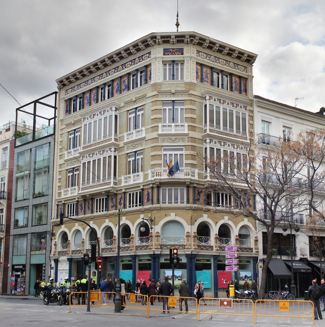 Edificio Monforte de Lucas García Cardona en Valencia